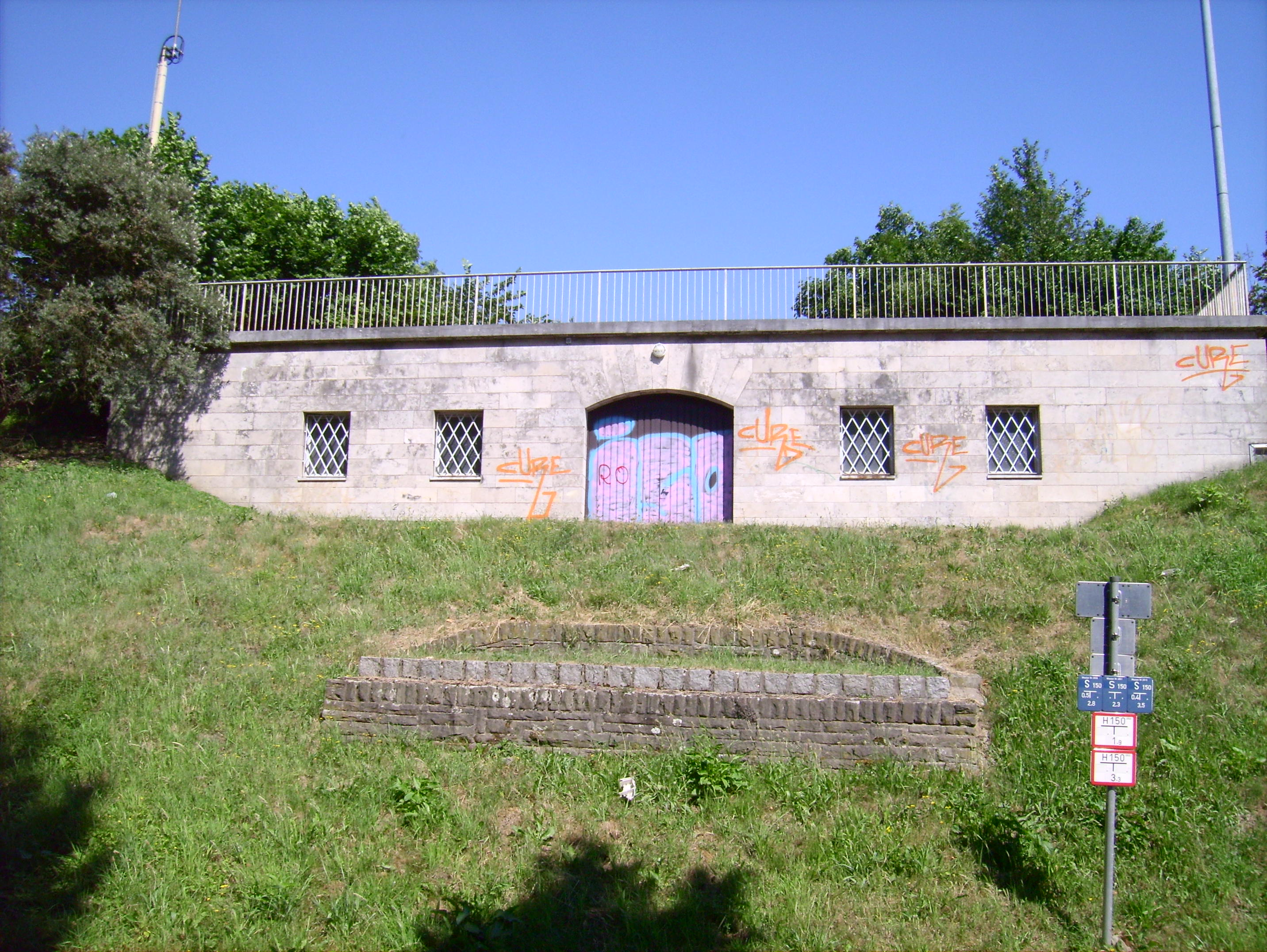 Pumpstation auf dem Helenenberg, Witten, Deutschland